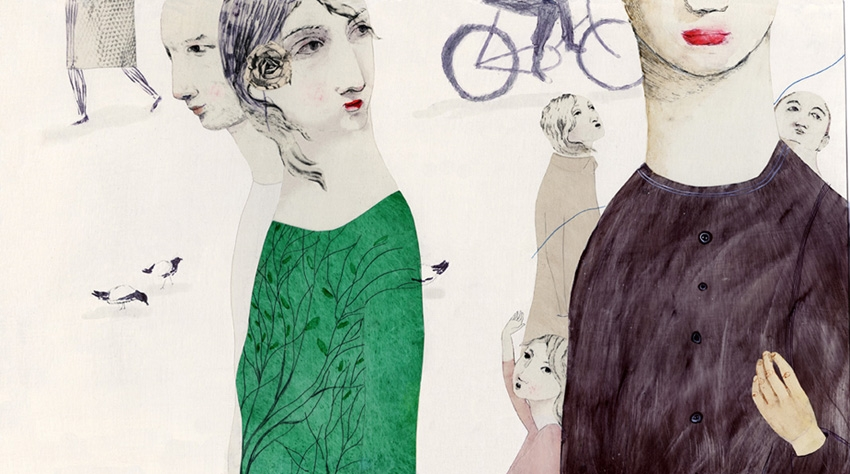 Iraia Okina